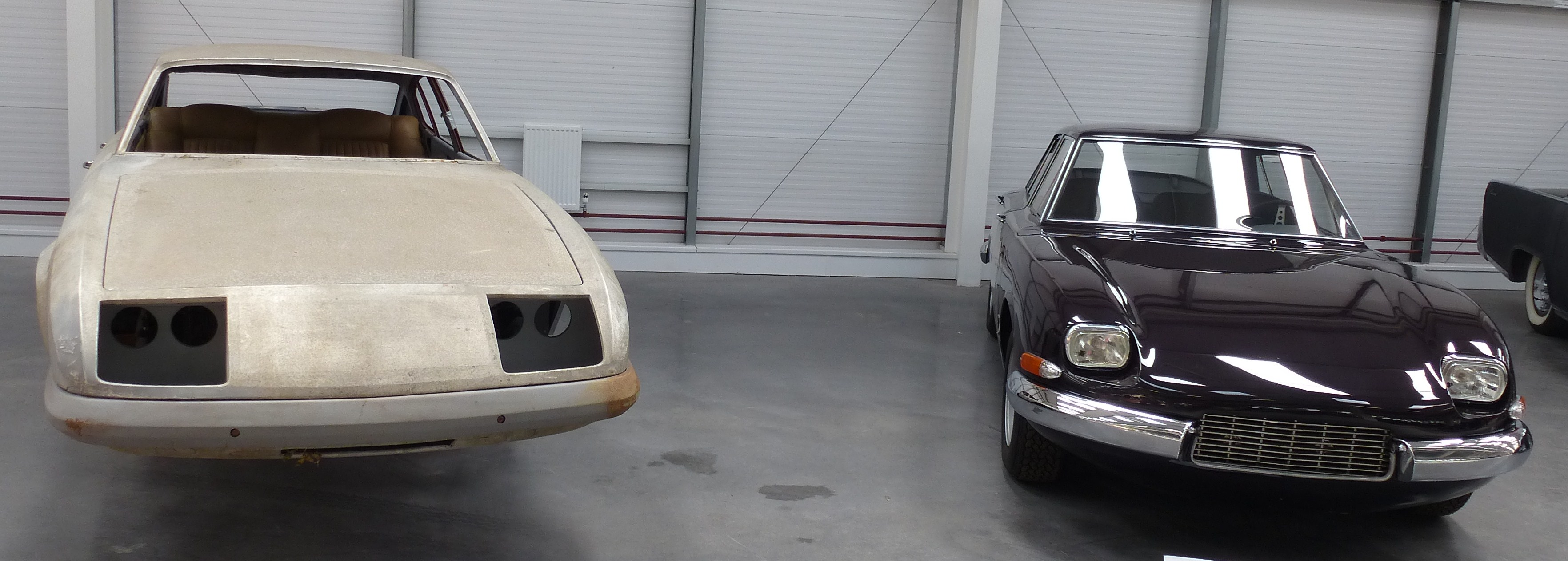 Monica Prototyp 22 von 1970 (links) und Monica Prototyp 1 von 1968 (rechts)